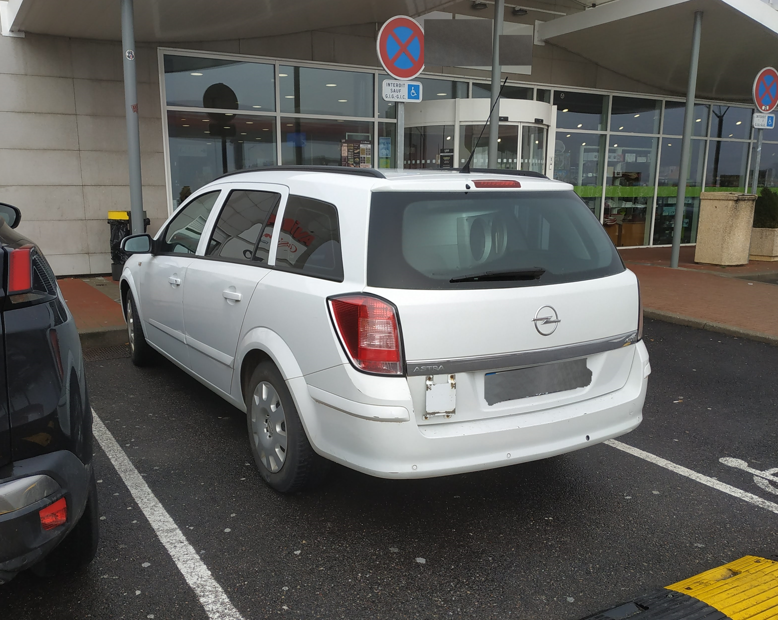 Opel banalisé servant à positionner des radars mobiles, véhicule de la Gendarmerie nationale